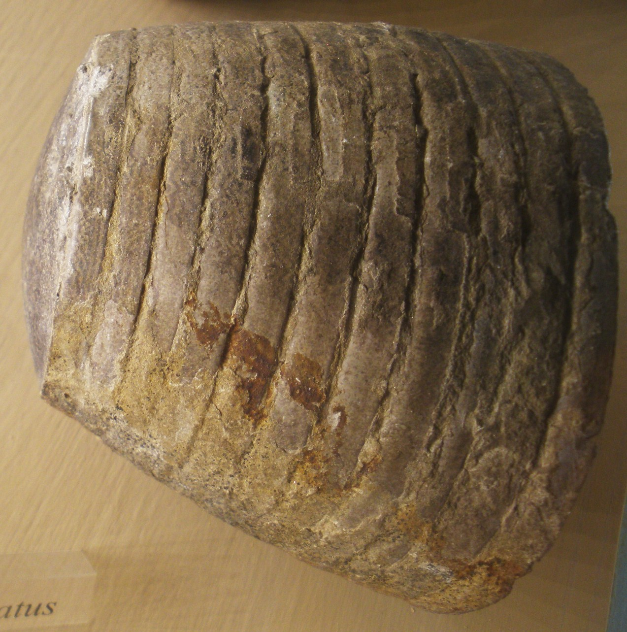 Fossil of Cyrtoceras, an extinct mollusc- Took the picture at Museo di Paleontologia di Firenze